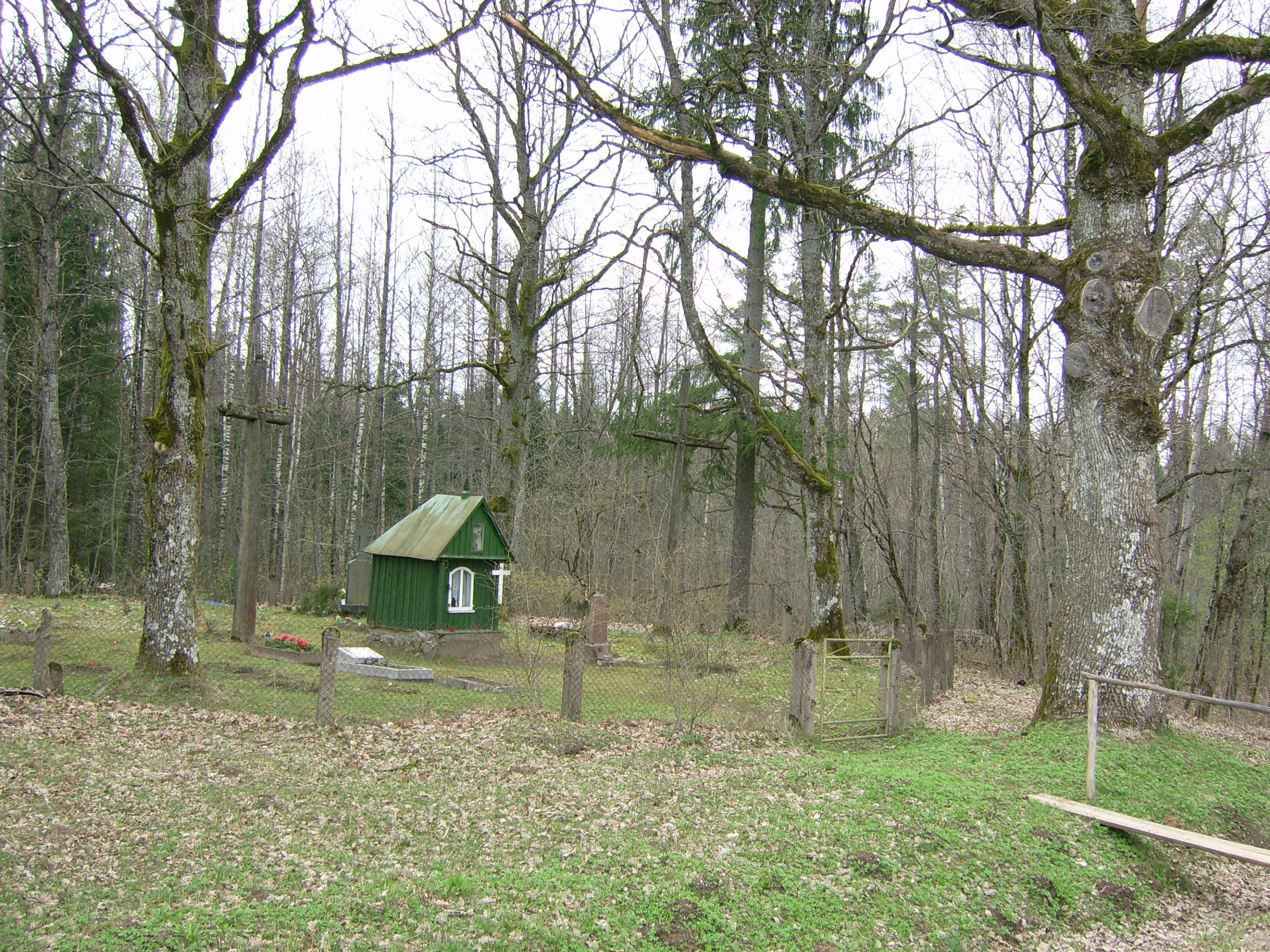 Šakviečio kapinės